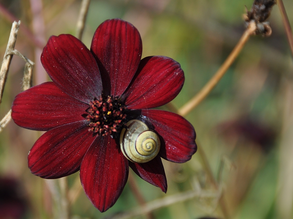 Schokoladen-Kosmee (Cosmos atrosanguineus) im Botanischen Garten zu Münster